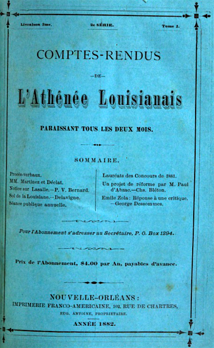 Cover of journal "Comptes-Rendus de l'Athénée Louisianais", published in New Orleans, Louisiana, USA.